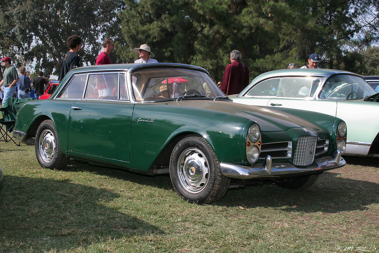 1963 Facel Vega III - green - fvr-1